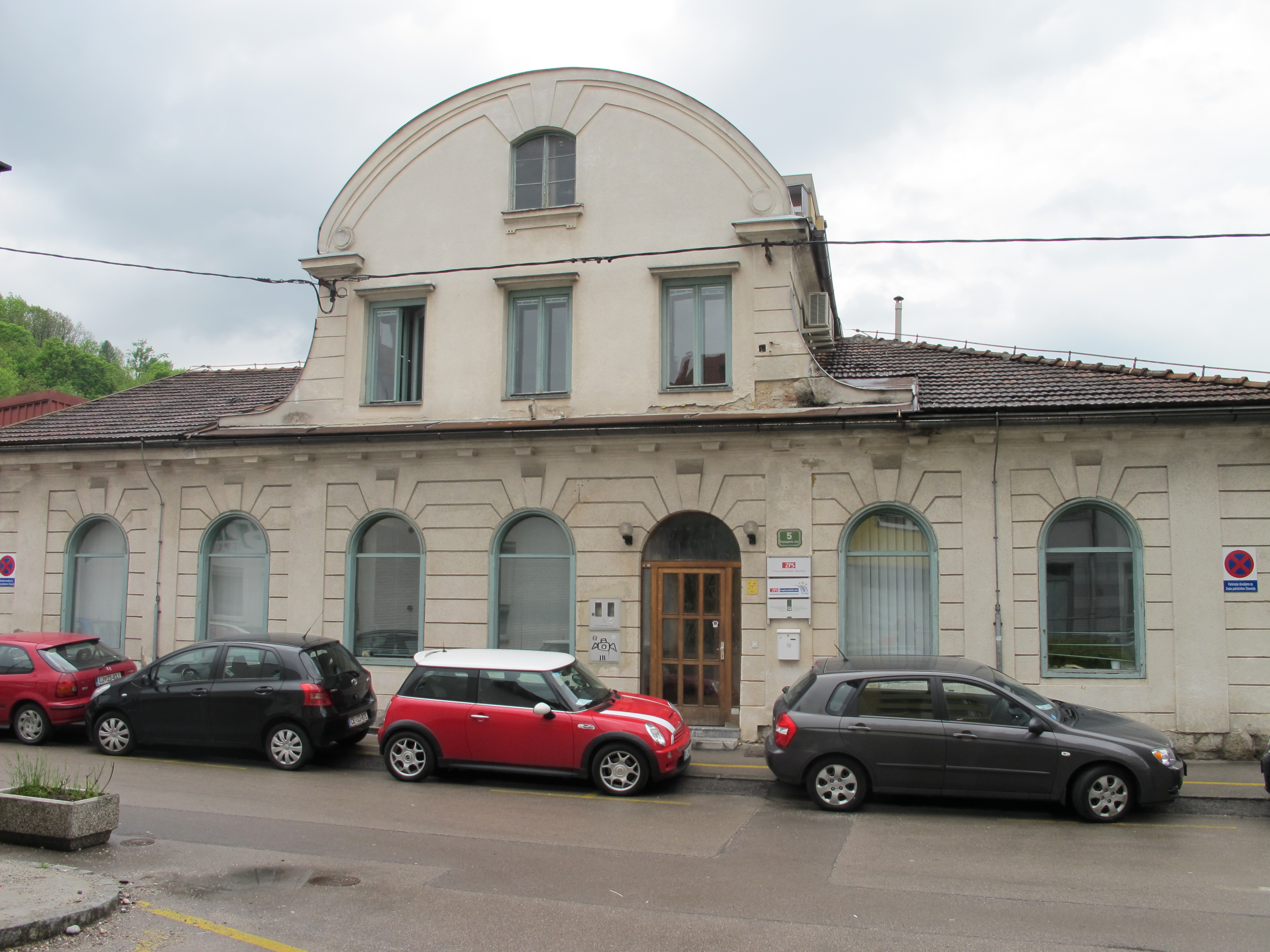 Nekdanja gostilna Reininghaus, danes sedež Zveze za varstvo potrošnikov